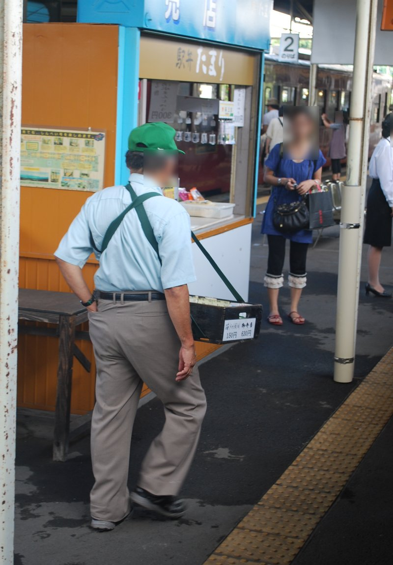 吉松駅の駅弁売り。湧水町。